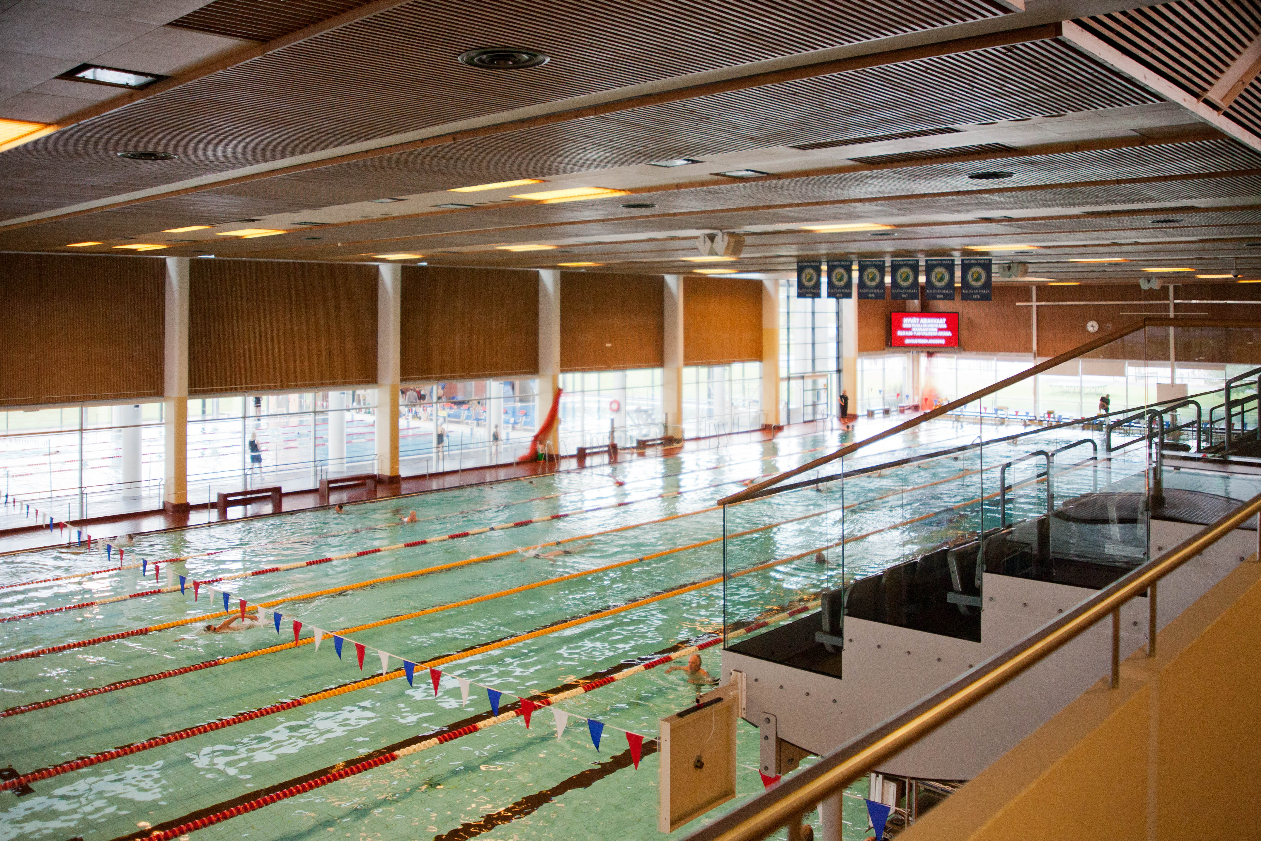 Tampereen uintikeskus on September 17 2010.